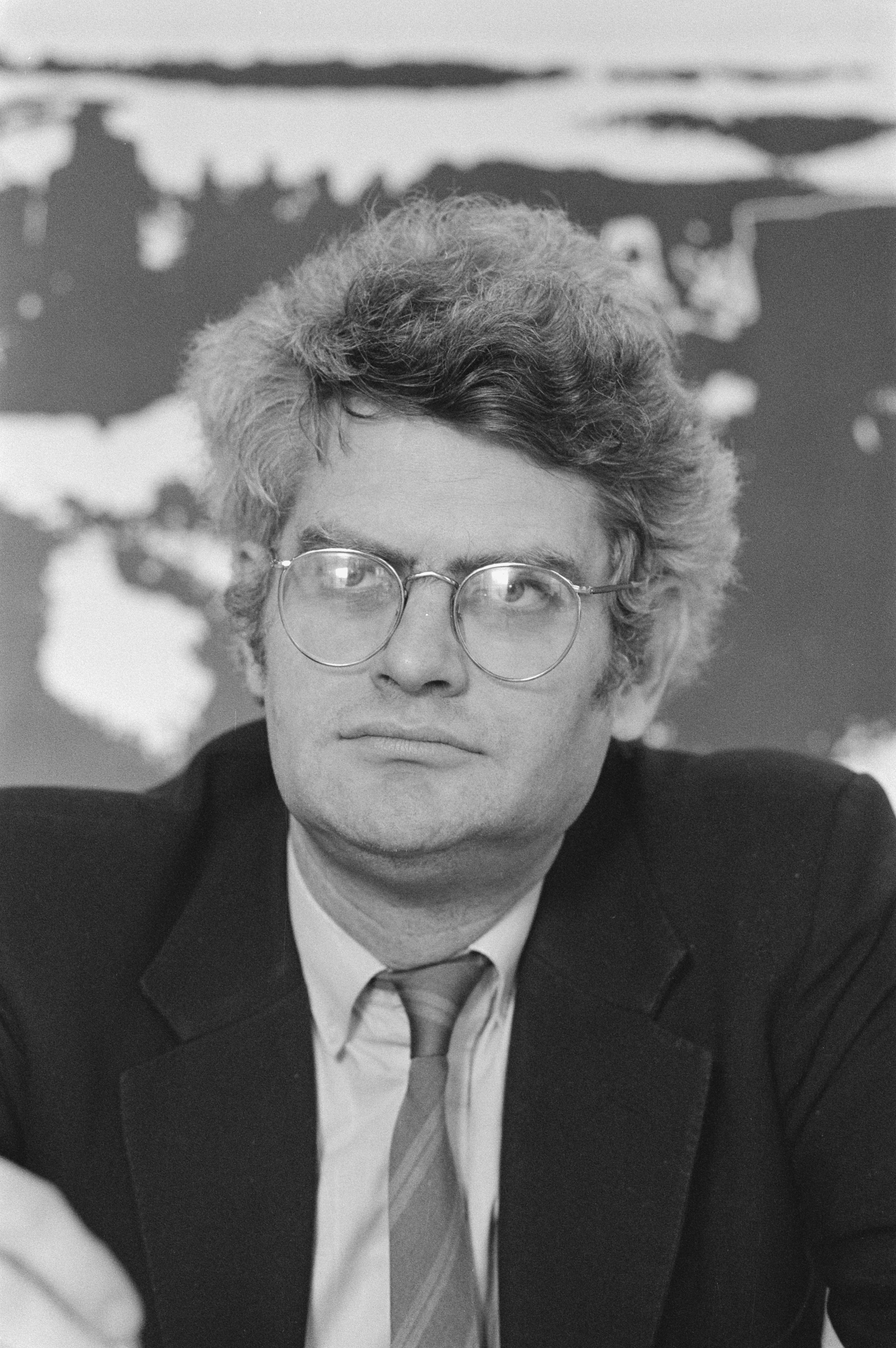 Collectie / Archief : Fotocollectie Anefo Reportage / Serie : [ onbekend ] Beschrijving : Persconferentie PvdA in Nieuwspoort; Maarten van Traa , kop Datum : 27 maart 1985 Trefwoorden : persconferenties Persoonsnaam : Traa, Maarten van Fotograaf : Croes, Rob C. / Anefo Auteursrechthebbende : Nationaal Archief Materiaalsoort : Negatief (zwart/wit) Nummer archiefinventaris : bekijk toegang 2.24.01.05 Bestanddeelnummer : 933-2793